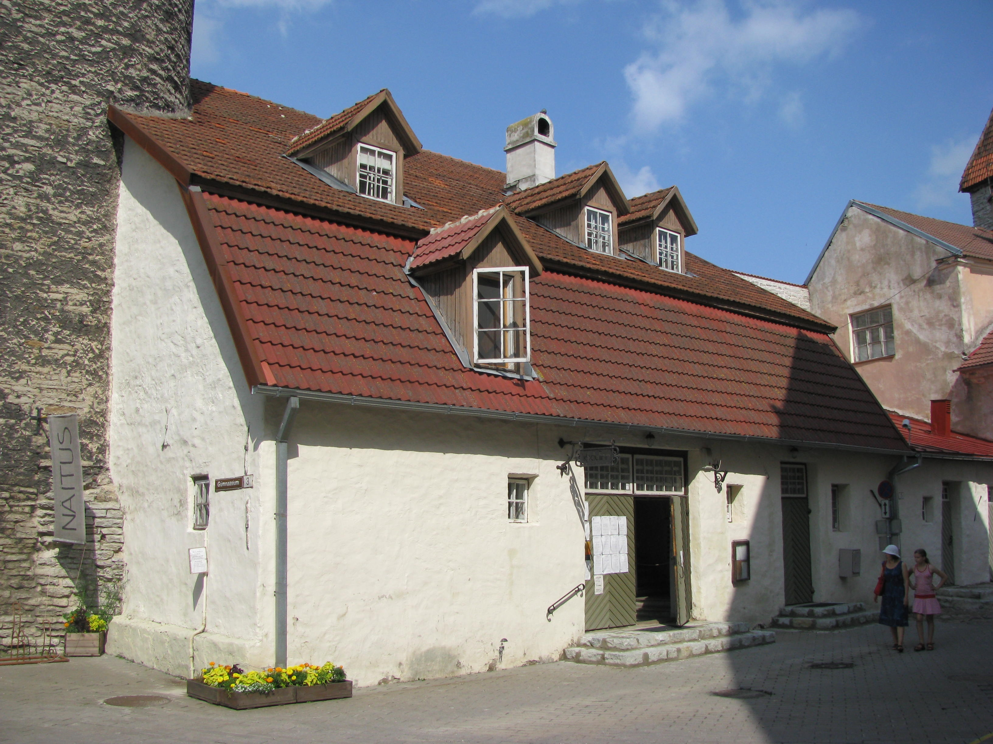 Kodulinna Maja, Tallinna Noorte Klubi Kodulinn kodu Tallinna linnamüüri ääres, Kuldjala torni külje all..